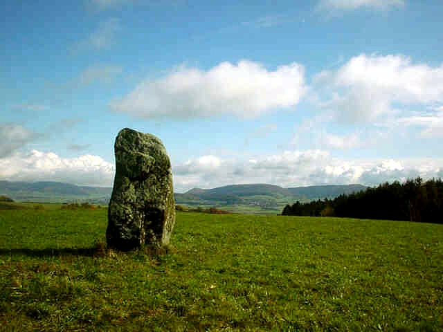 Menhir bei Degernau - Baden-Württemberg - Deutschland